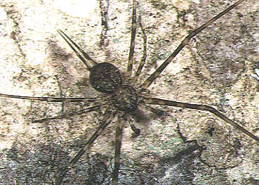 male Hersilia yaeyamaensis from Okinawa.